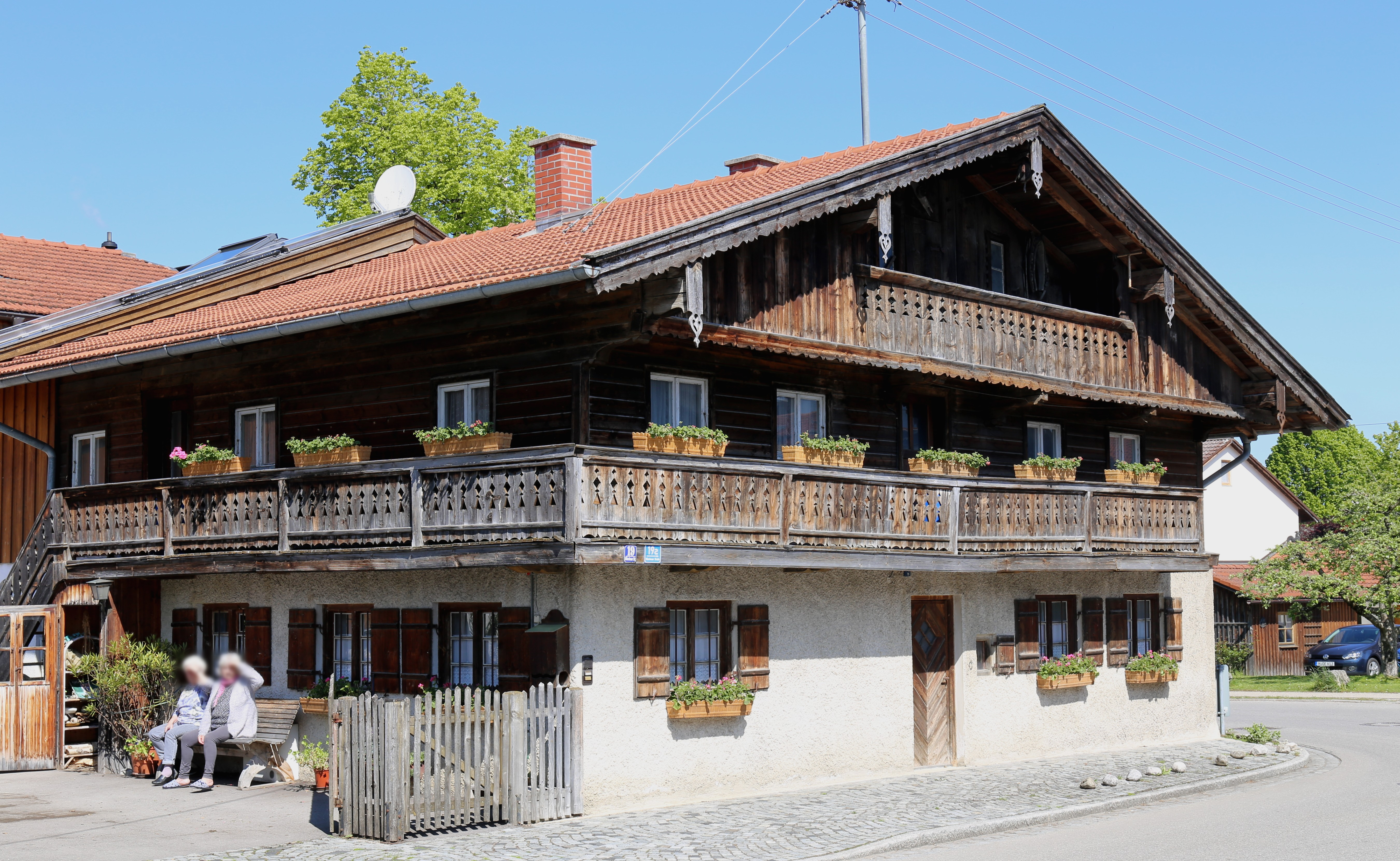 Münchener Straße 19, Aying; Wohnteil des ehemaligen Einfirsthofes Tagwerker, zweigeschossiger Flachsatteldachbau mit verschaltem Blockbau-Obergeschoss, Hochlaube und zweiseitig umlaufender Laube, zweite Hälfte 18. Jahrhundert.